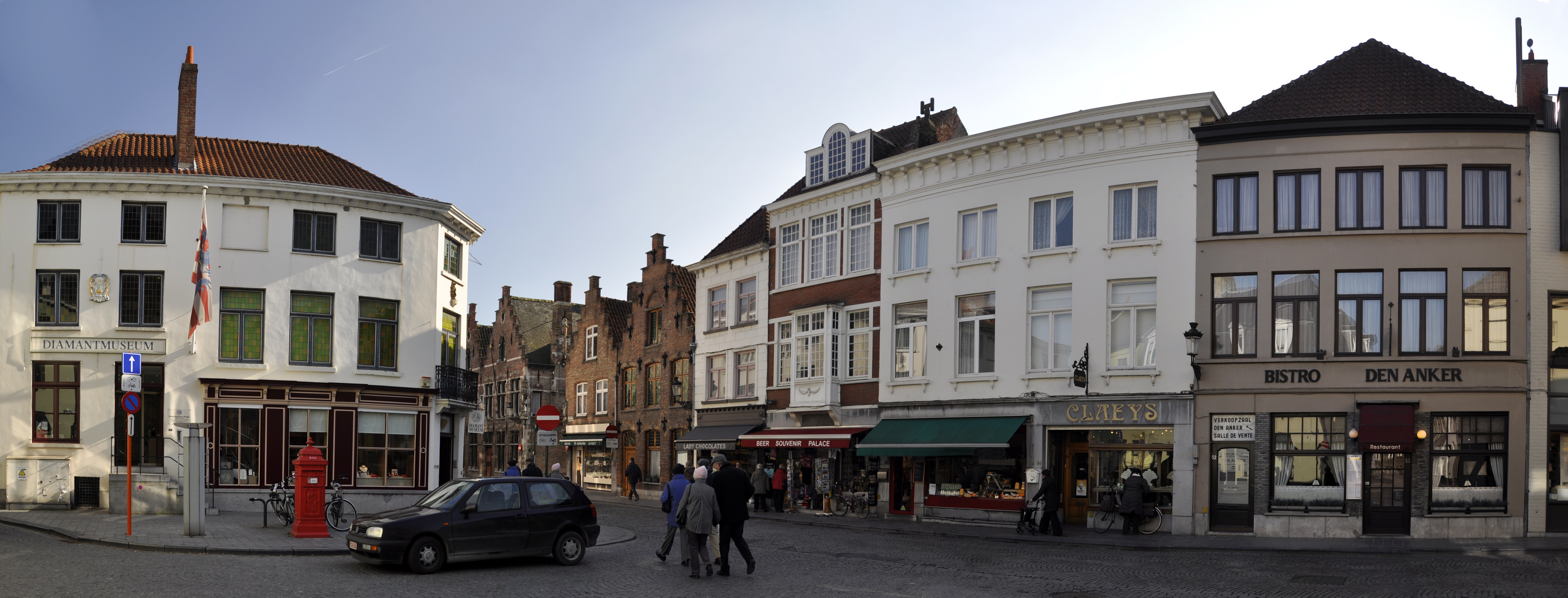 Panorama van het Ankerplein, gemaakt met photoshop (photomerge) waarbij ongewenste details van de samengevoegde foto's zijn gecorrigeerd met photoshop (zie foto :File:Photoshopeigenaardigheden 9-03-2010 15-34-27.jpg